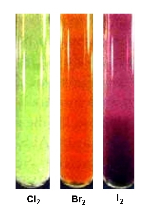 A halogén elemek gőze színes